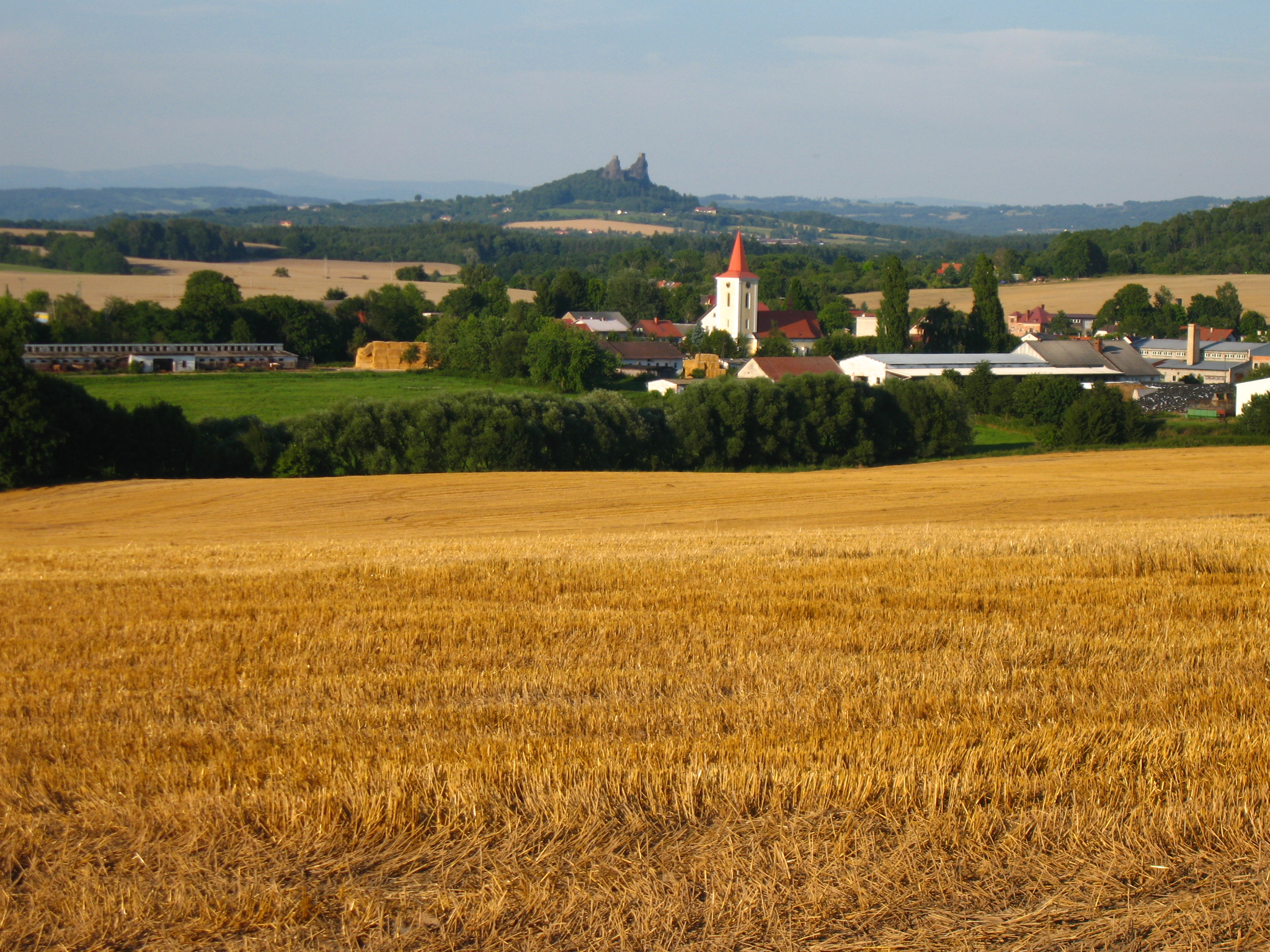 Hrad Trosky a obec Libošovice v popředí